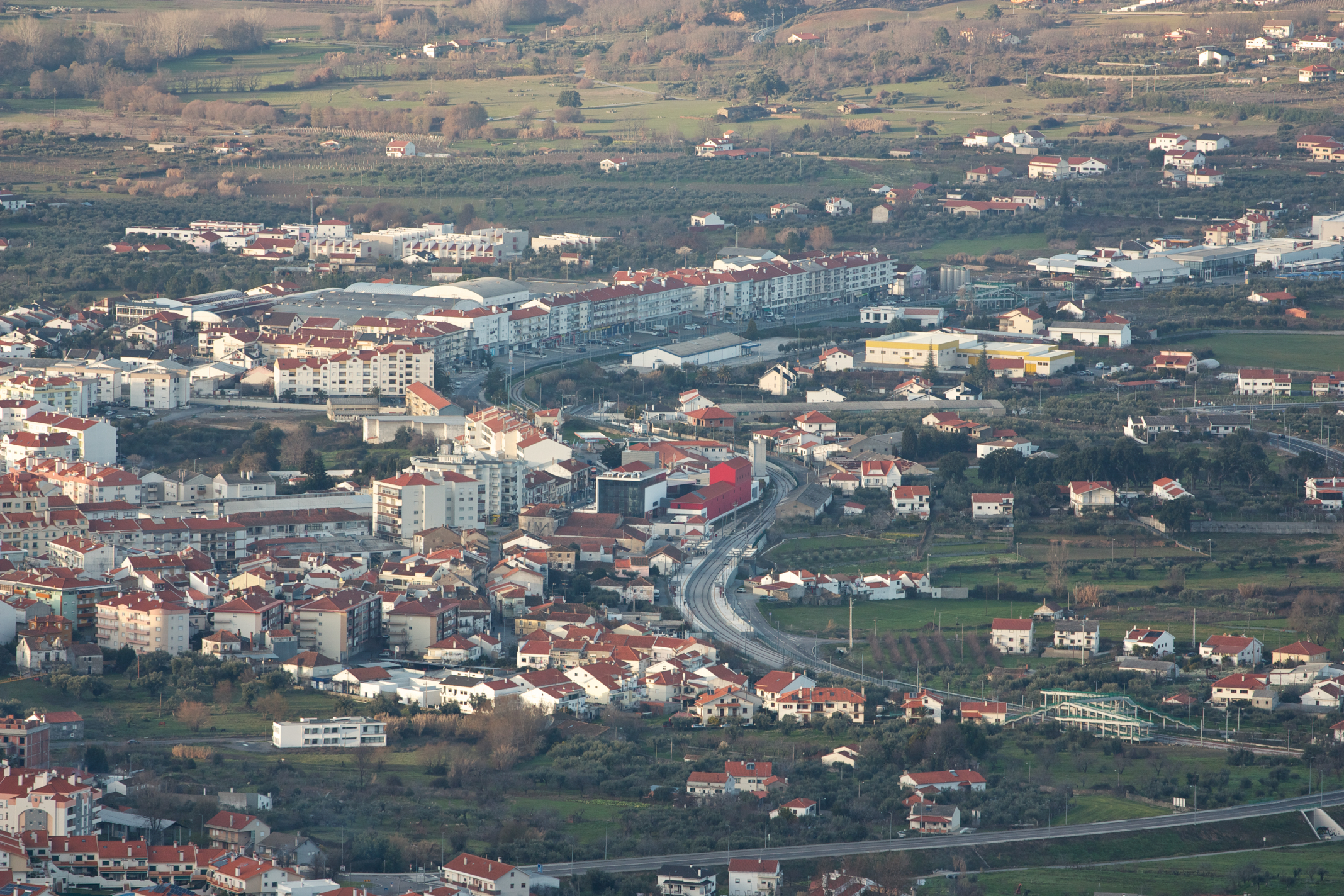 Tipo: ES [Estação Satélite] Local: Fundão [Linha da Beira Baixa, PK 147] Data e hora: 1 de Janeiro de 2013 [16h18] vista da Casa do Guarda (na vertente Norte da Serra da Gardunha).